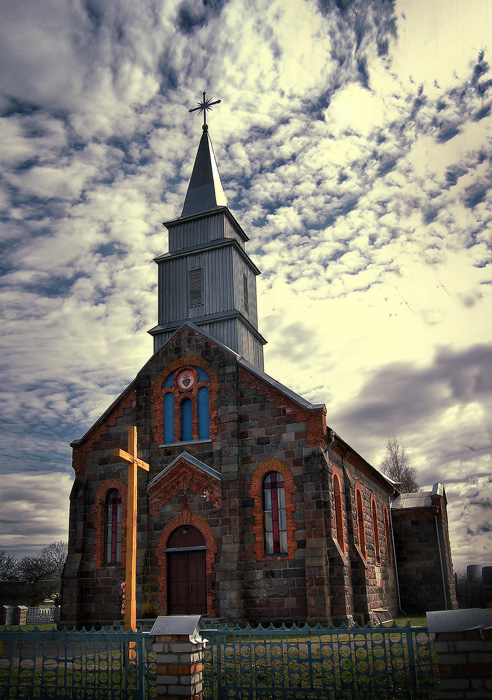 Беларуская (тарашкевіца): Касьцёл Найсьвяцейшага Сэрца Пана Езуса ў вёсцы Ільля